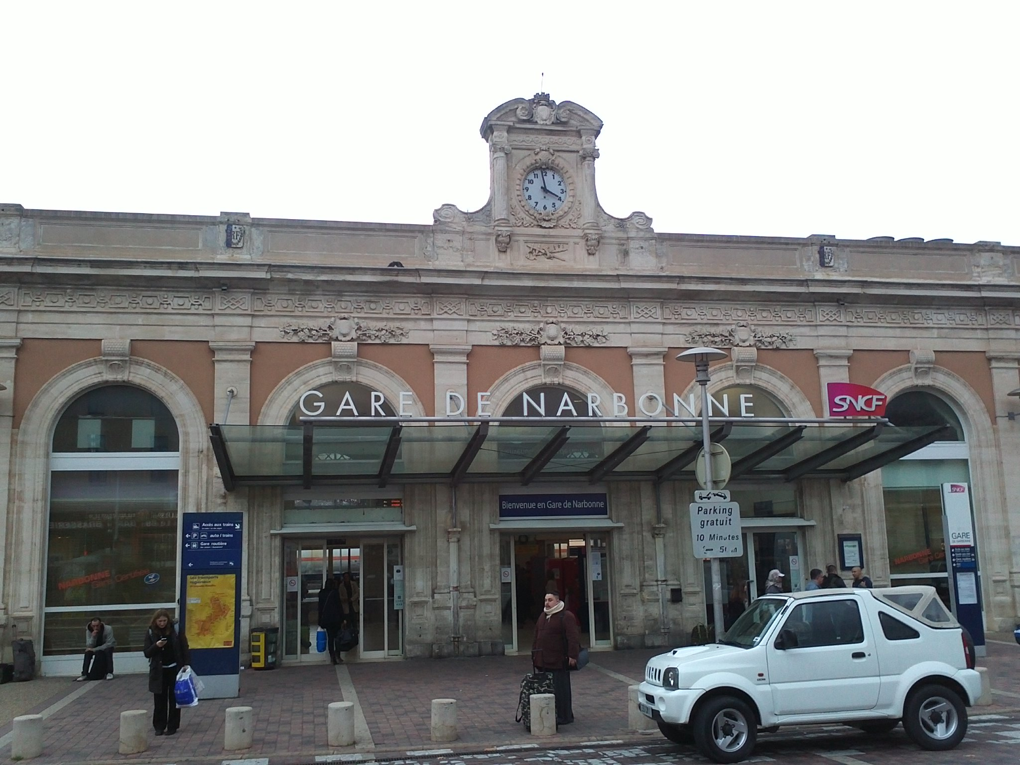 纳博讷站（Gare de Narbonne）